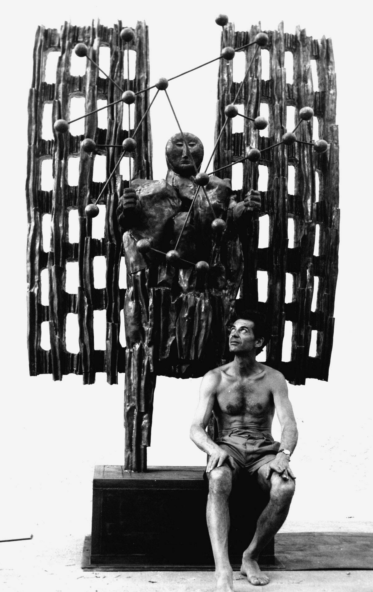 La chimie, fer forgé galvanisé, 1963, artiste: Jean Vincent de Crozals